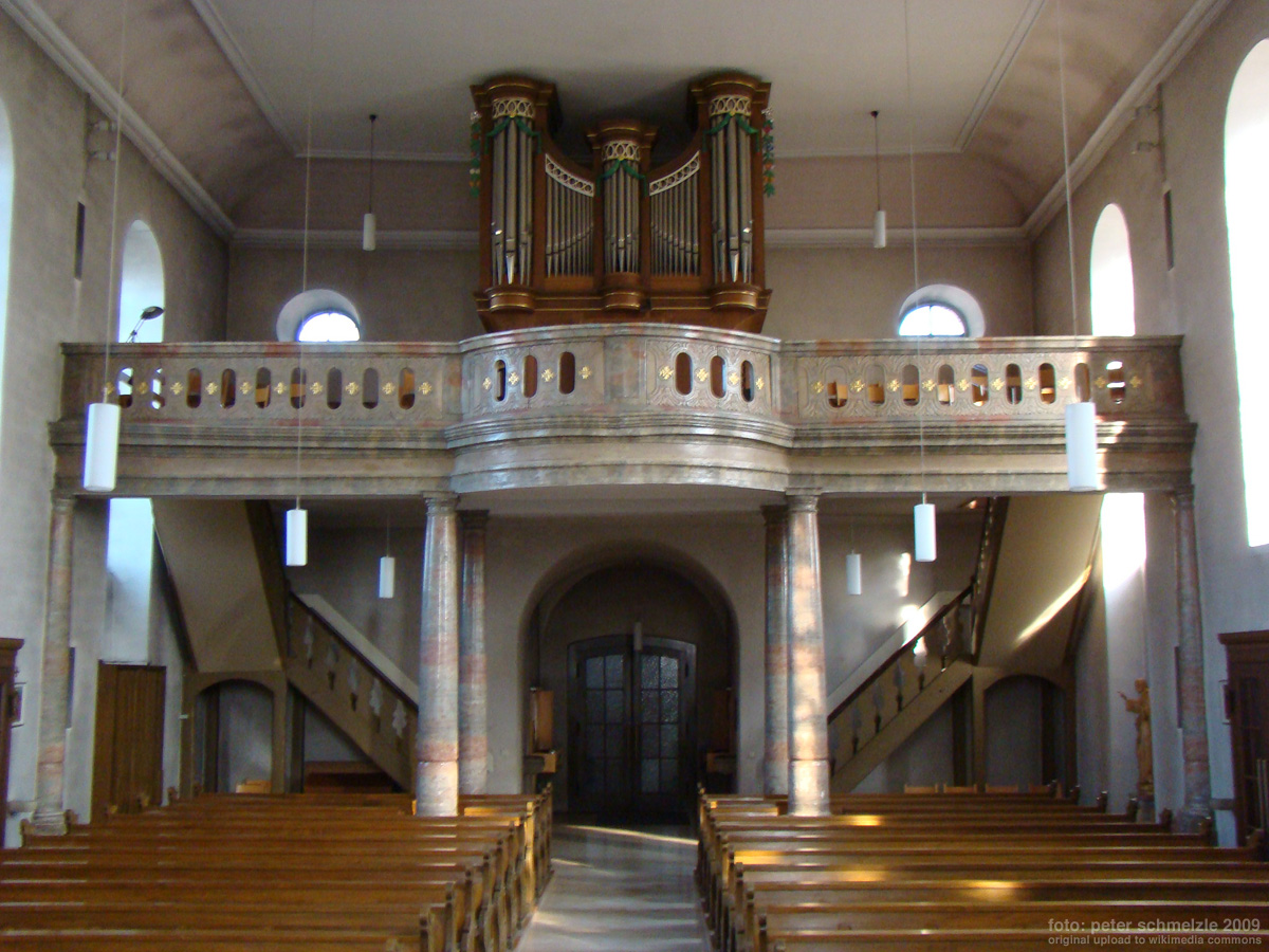 Valentinskirche in Rohrbach am Gießhübel